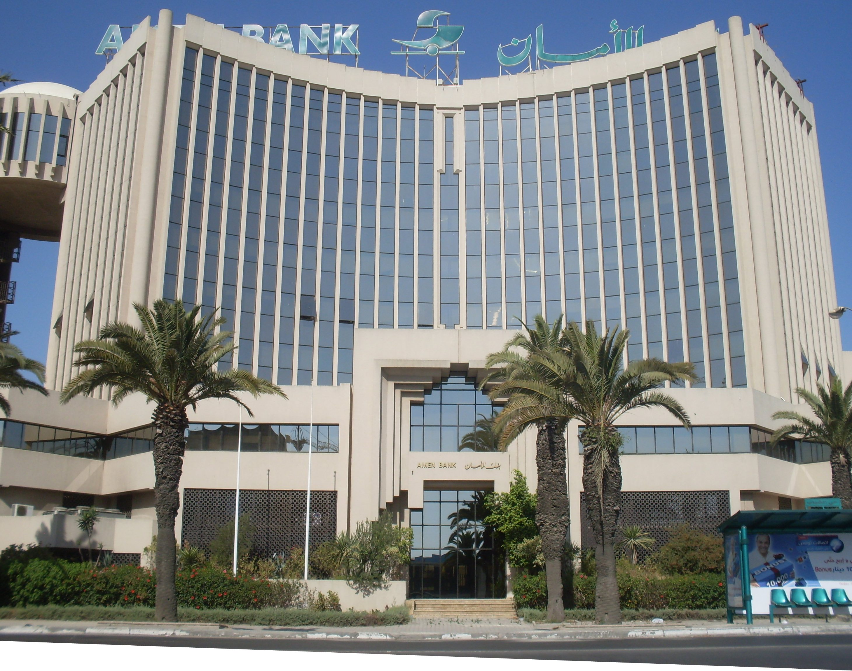 Siège de l'Amen Baque, Tunis